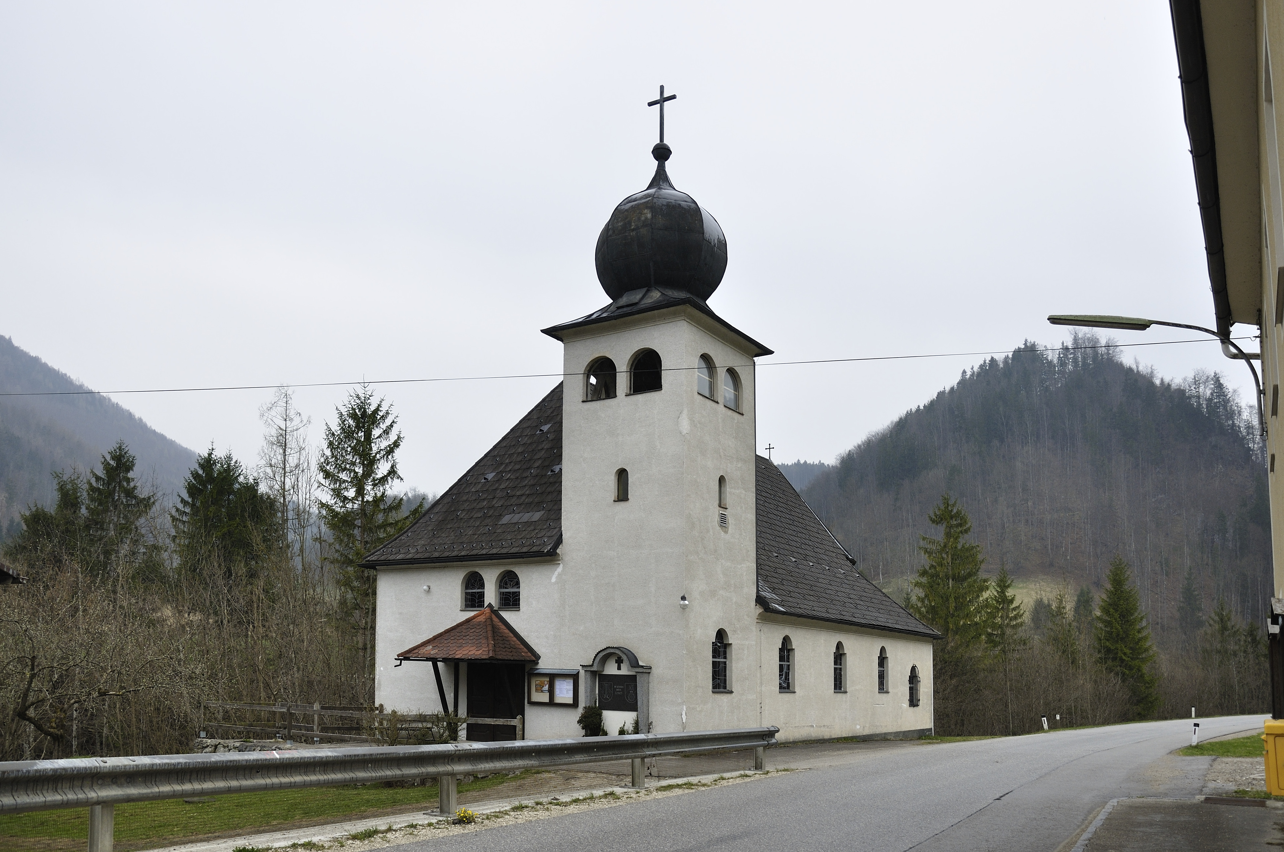 Kaplaneikirche hl. Josef